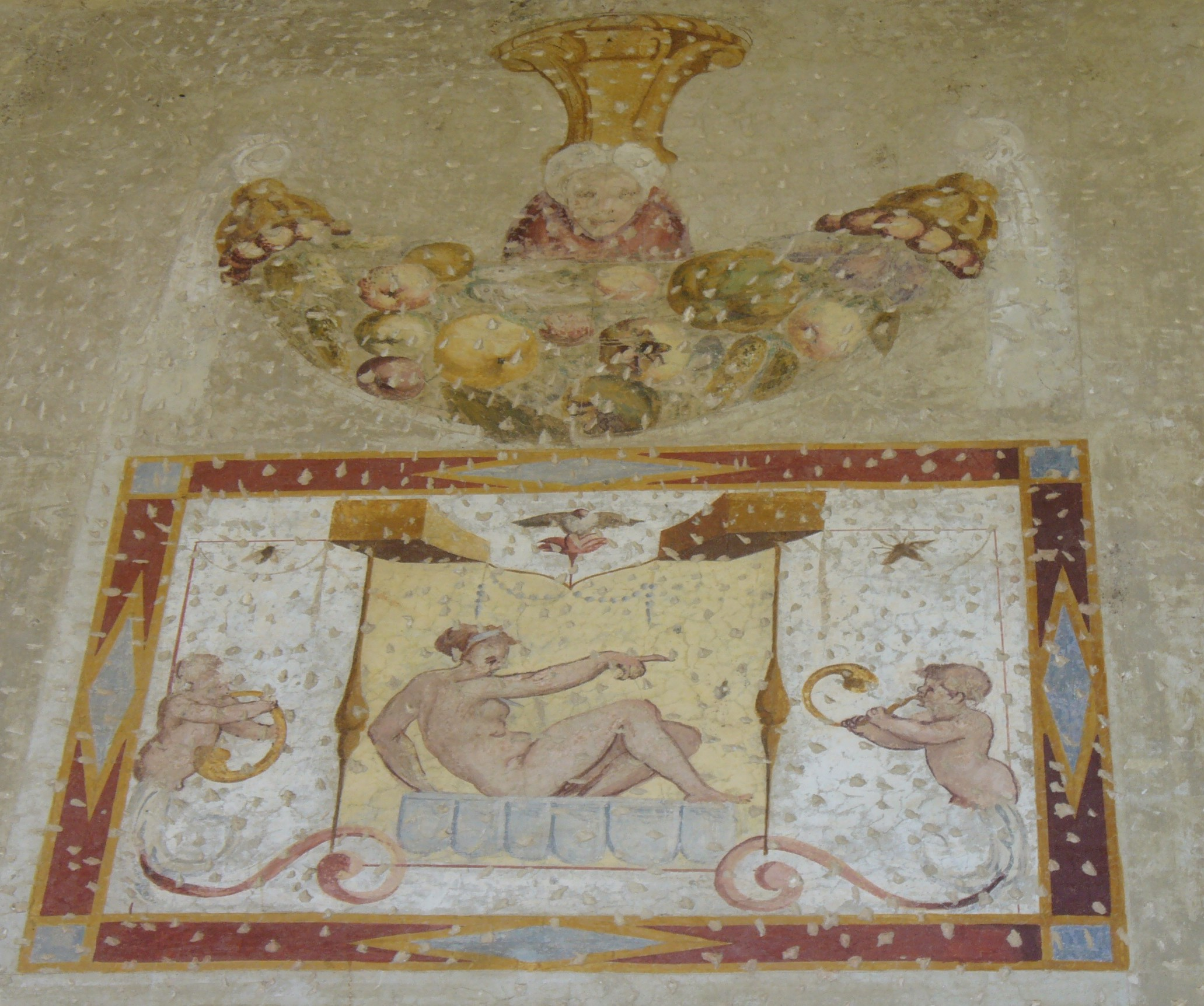 Frescos of Villa Badoer, Fratta Polesine.